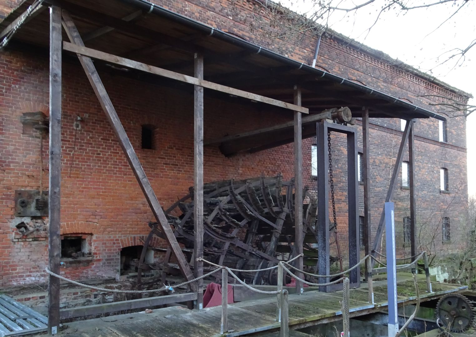 Panstermühle in Wallendorf (Luppe)